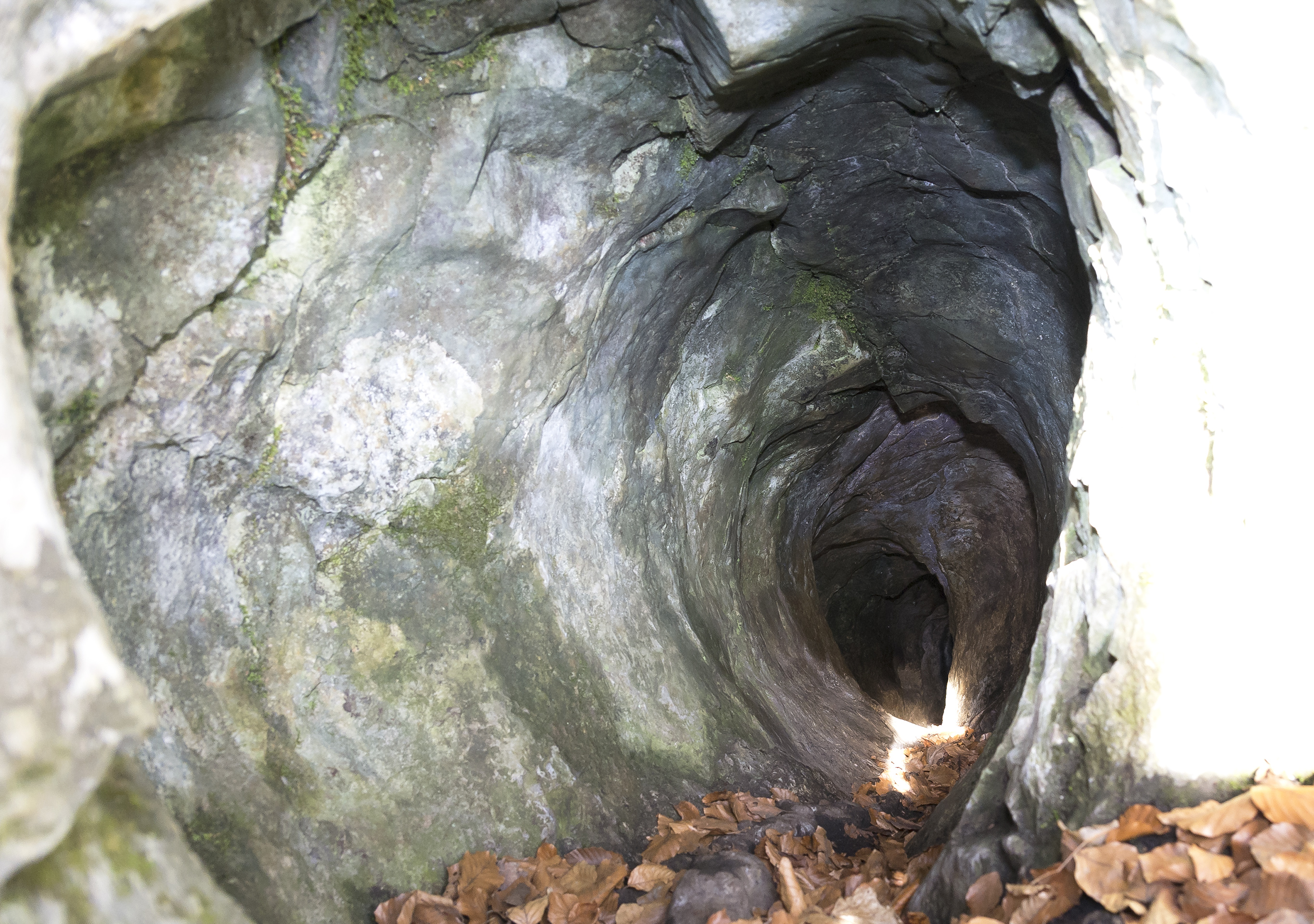 Jaskinia Beczkowa w Dolinie Racławki